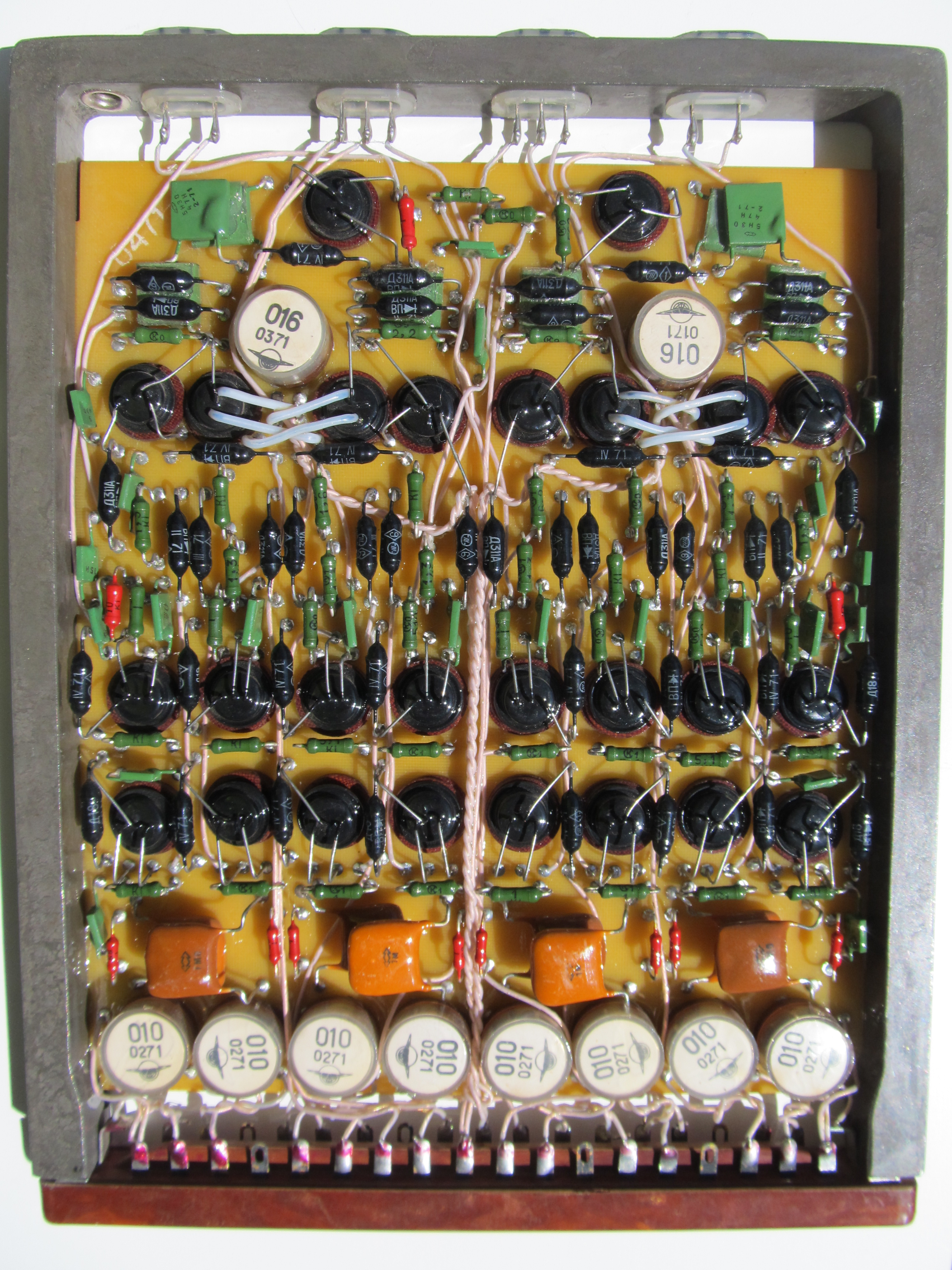 Schaltkarten aus der BESM-6 des VEB Kraftwerksanlagenbaus Berlin.